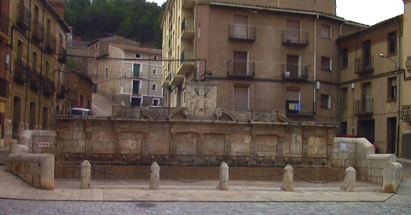 Daroca - Fuente